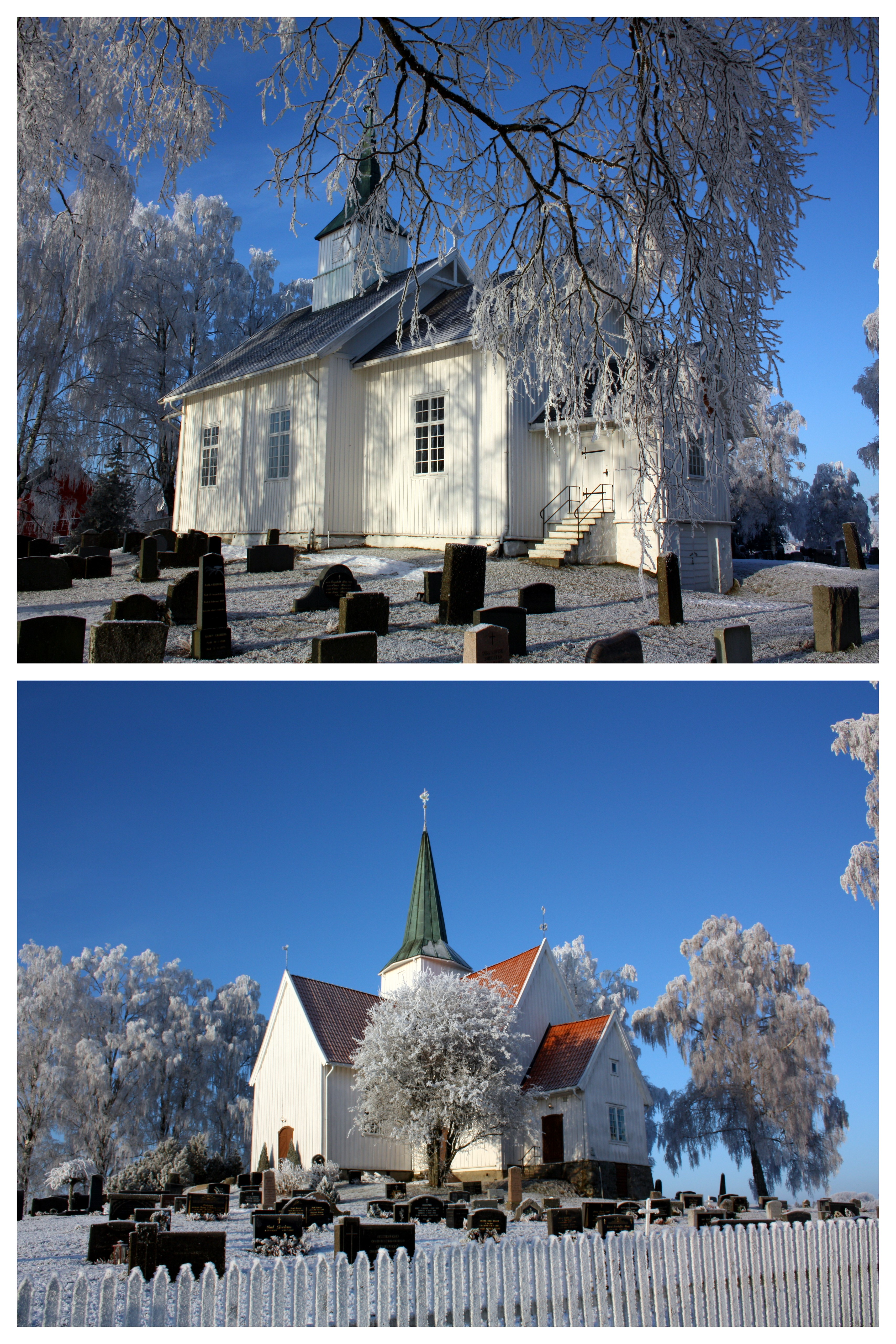 Norsk (bokmål): I Gjerdrum kommune er det to kirker; Gjerdrum kirke (1686) og Heni kirke (1864)